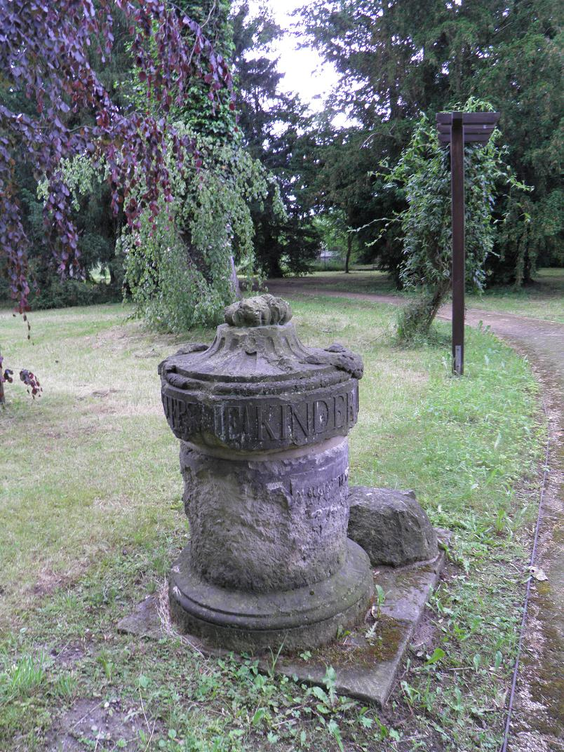 Fragment der Opfersäule im Park Heilsberg